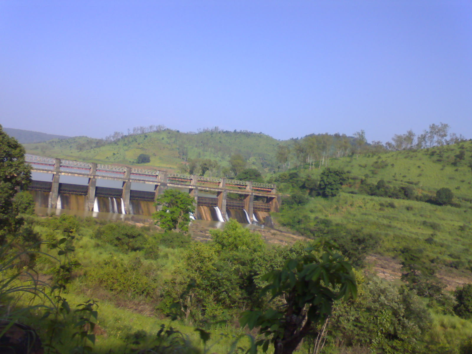 Jalhaput Dam